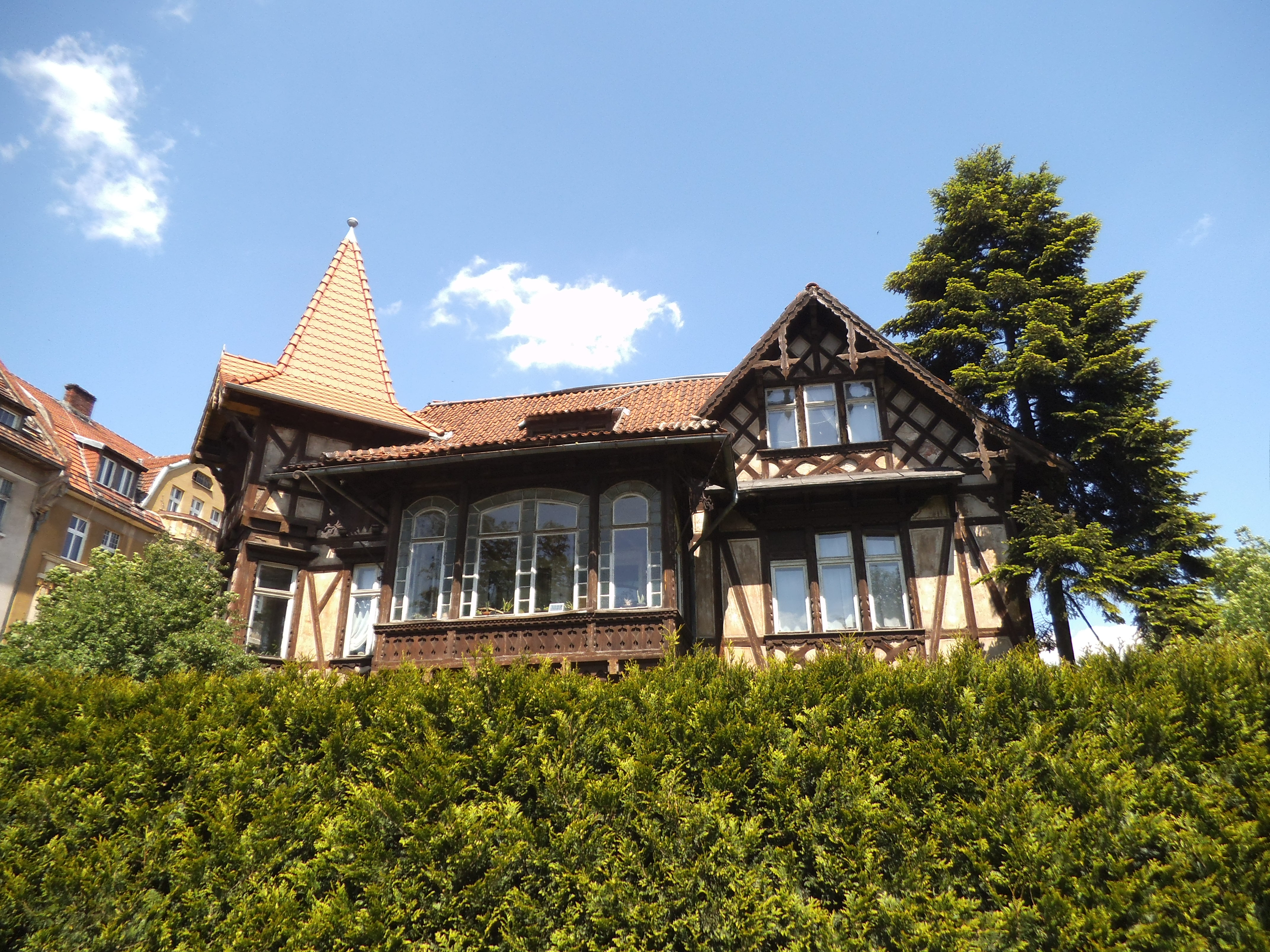 Muzeum Zabawek w Toruniu